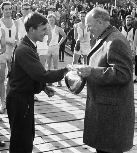 Siegerehrung. Im Bild überreicht CAU-Rektor Prof. Dr. Hebrert Schlenger (rechts) den Pokal des Rektors der Christian-Albrechts-Universität (CAU) an den Achter der Universität London.